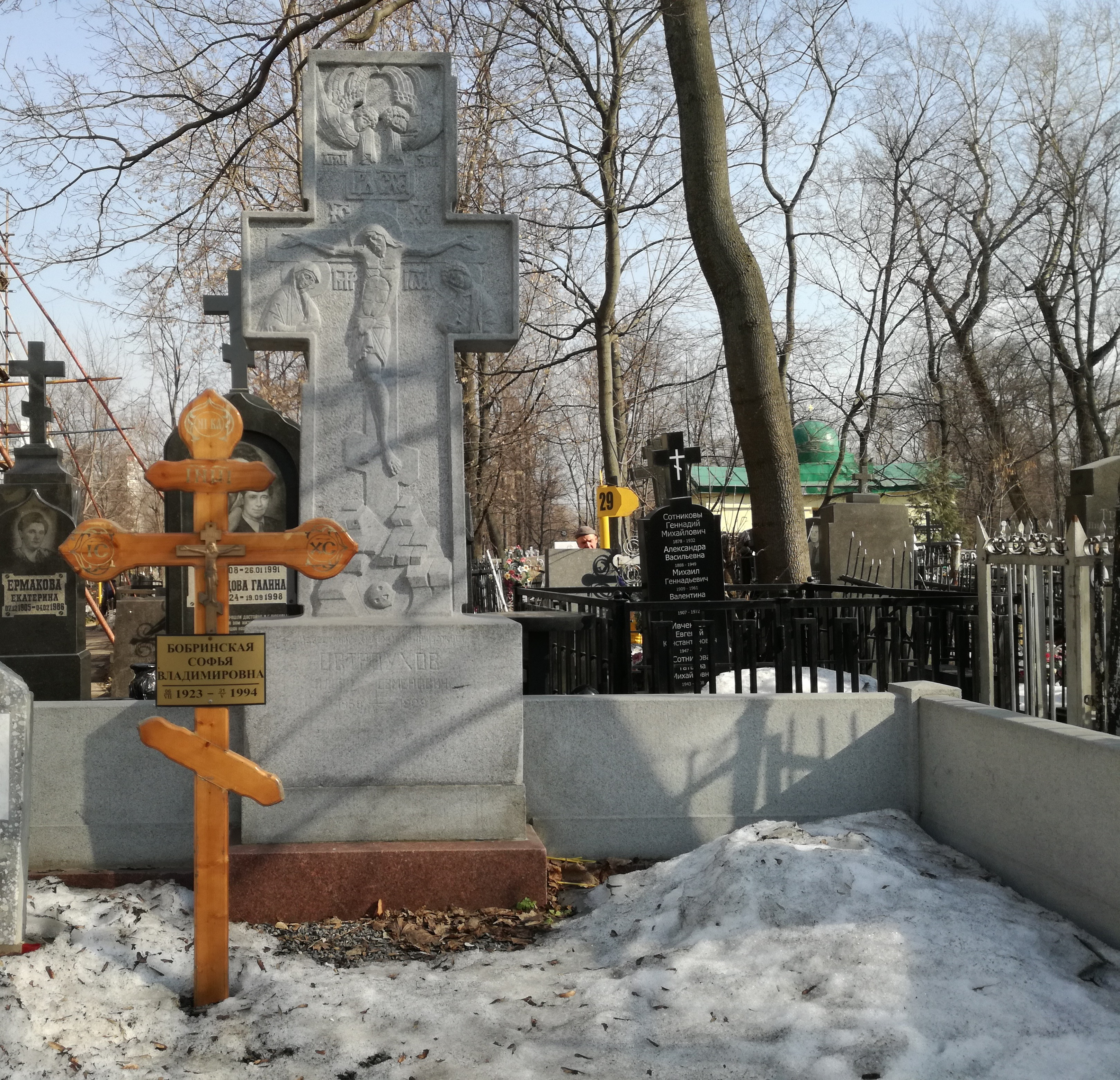 Даниловское кладбище. Могила художника Остроухова